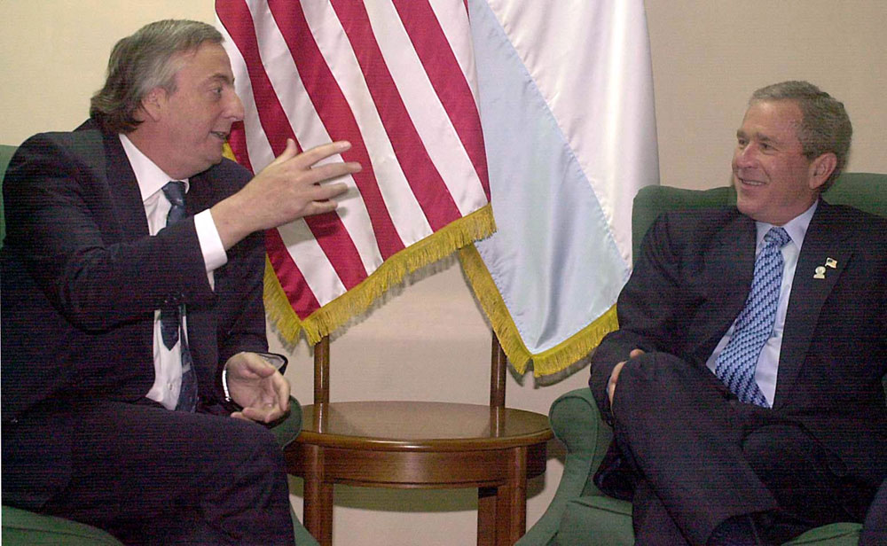 Monterrey, México - El presidente Néstor Kirchner junto a su par de estadounidense George Bush.